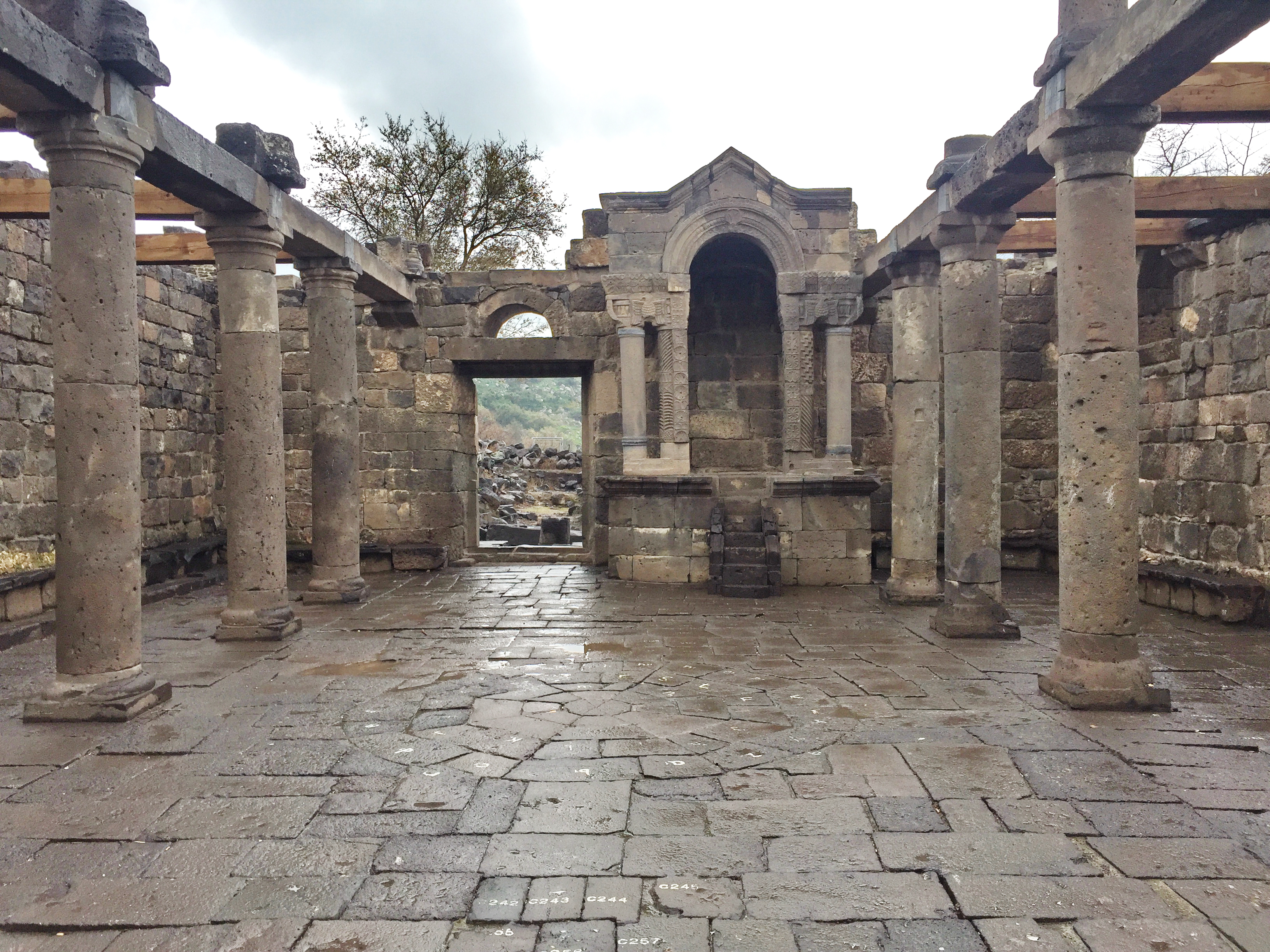 בית הכנסת העתיק באום אל-קנאטר הוא בית כנסת עתיק מתקופת המשנה והתלמוד שנחשף בדרום רמת הגולן באתר אום אל-קנאטר סמוך למושב נטור. בית הכנסת העתיק הוא מהמפוארים והחשובים מתקופה זו שנמצאו בארץ ישראל. האתר נקרא "קשתות רחבעם" על שם רחבעם זאבי שכיהן כשר התיירות כשאישר את תקציב החפירות בבית הכנסת ונרצח ימים ספורים לאחר מכן.